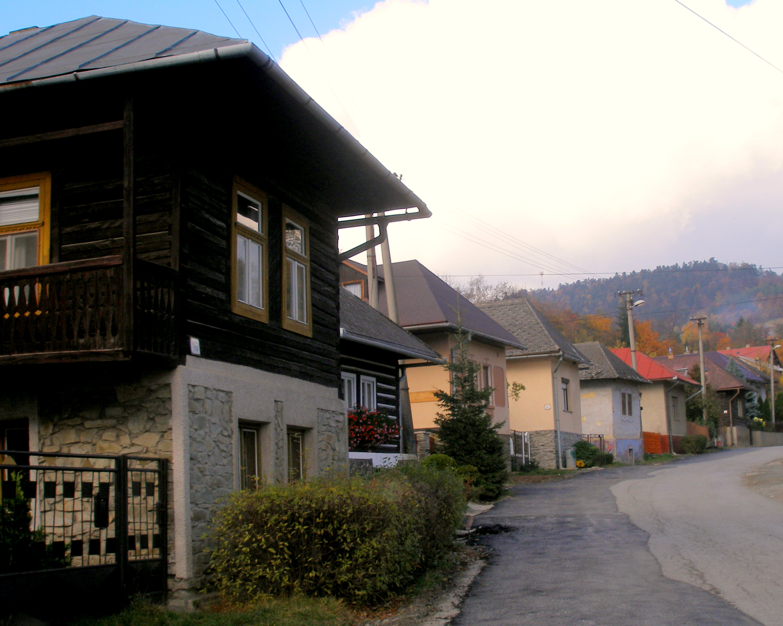 Podhorská obec Drienica, okres Sabinov, región Šariš